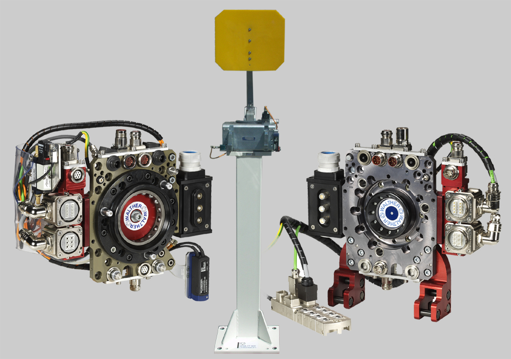 Werkzeugschnellwechselsystem bestehend aus Roboter- und Werkzeugseite sowie einer Werkzeugablage